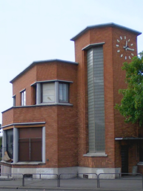 L'école normale du Bourget en 2006